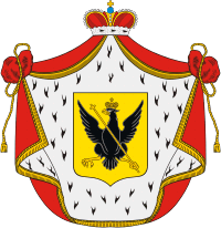 Герб рода князей Горчаковых